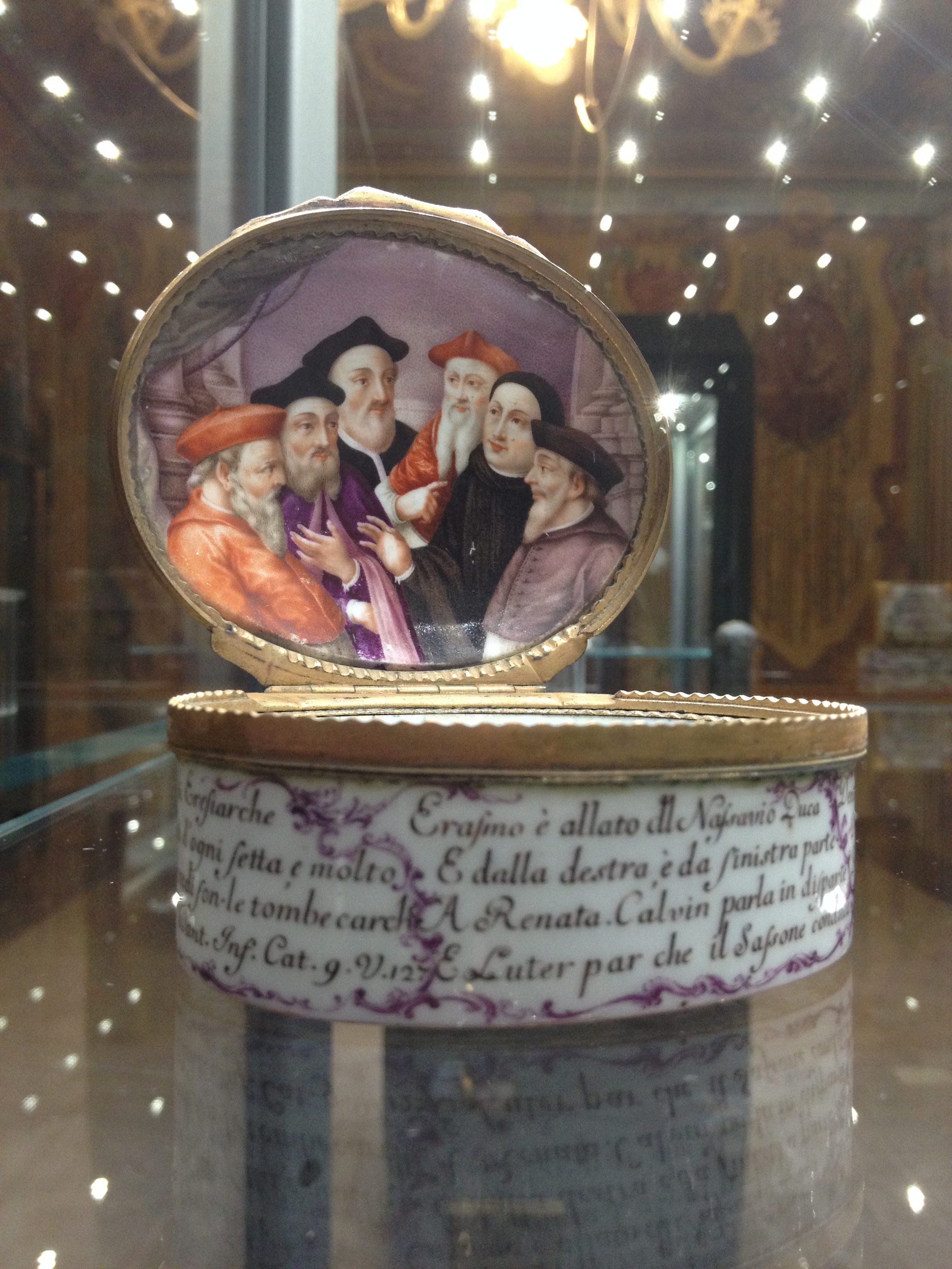 La Tabacchiera degli eresiarchi della Manifattura Doccia, anno 1760, del Museo Duca di Martina di Napoli. Interno: i rappresentanti della controriforma: Gaetano de Vio, Jacopo Sadoleto, Francesco Panigarola, Johannes Eck, Ebehard Billick, Leonhard Halle vescovo. Porcellana/Pittura/Doratura, Rame/Cesellatura/Doratura In questa foto esposta ad agosto 2015 nell'evento "Viaggio attraverso le preziose collezioni del Duca di Martina" provenienti dal Museo "Duca di Martina" di Napoli.